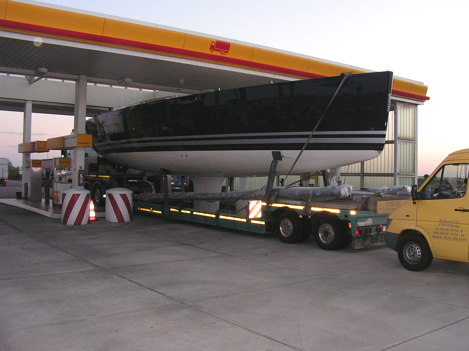 Osterfeld BAB A9 Tankstelle Transport mit Übergröße mit Begleitung mit zwei BF3 nach § 39 Abs 2a StVO Foto 2005 Wolfgang Pehlemann Wiesbaden PICT0137